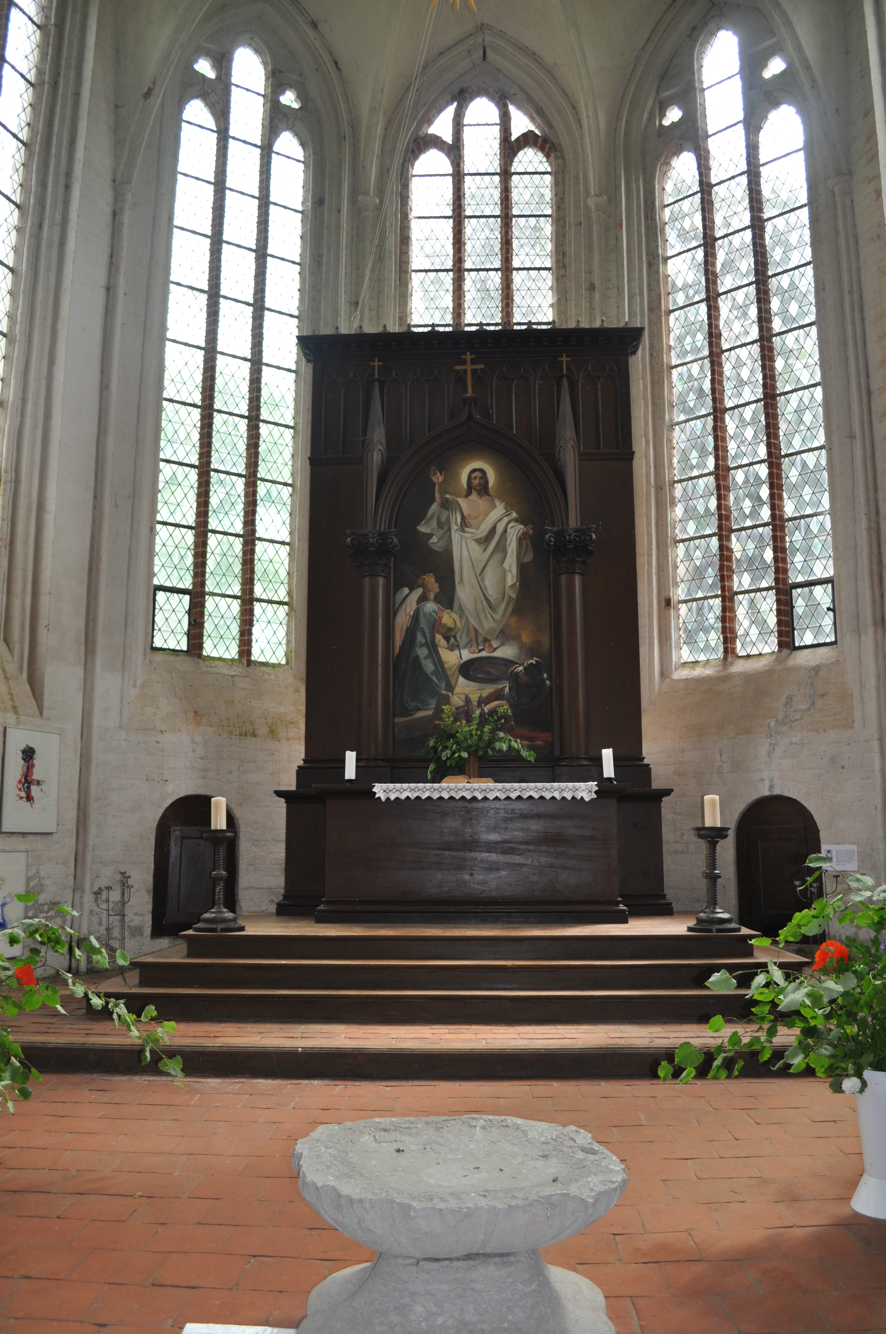 Kirche in Starkow, Nordvorpommern. Der Altar.